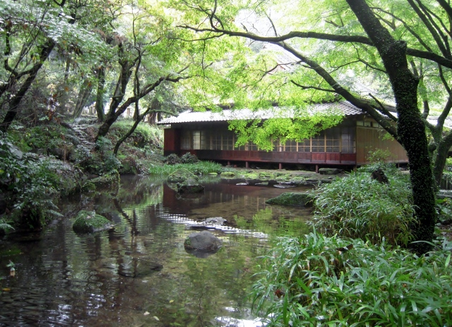 熊本市西区の成道寺。庭園は、熊本における山水庭園の代表格とされる。